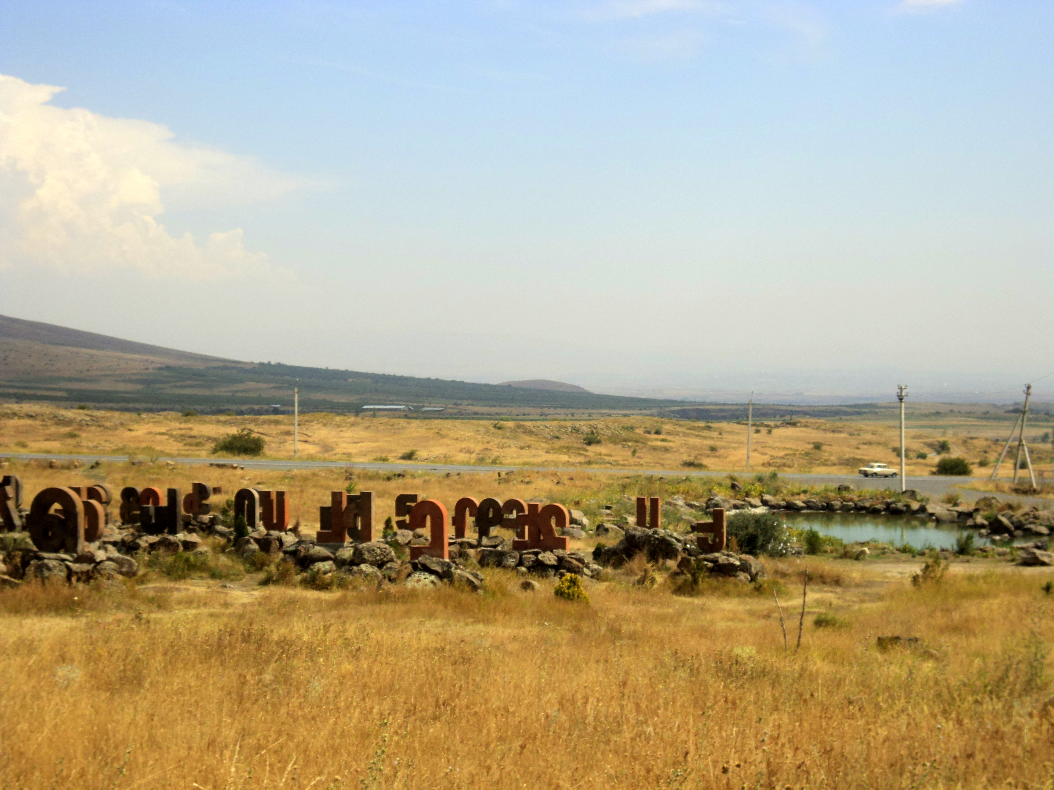 «Արտաշավան» բնապատմական համալիր, Հայոց այբուբենի հուշարձան